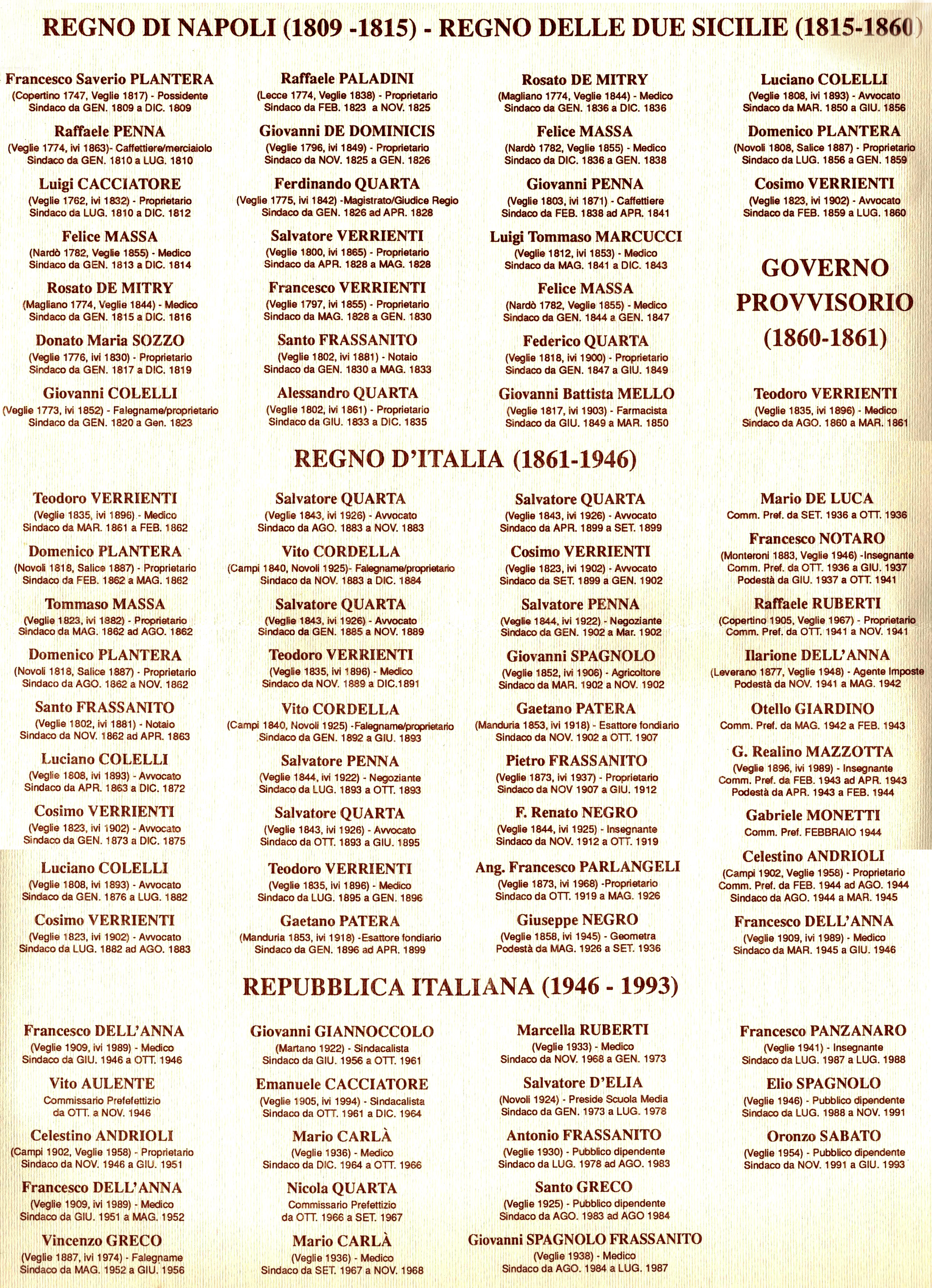 Albo dei sindaci, podestà e commissari prefettizi dal 1809 a Veglie fino al 1993 (scansione di opera con più di 20 anni e quindi nel pubblico dominio)